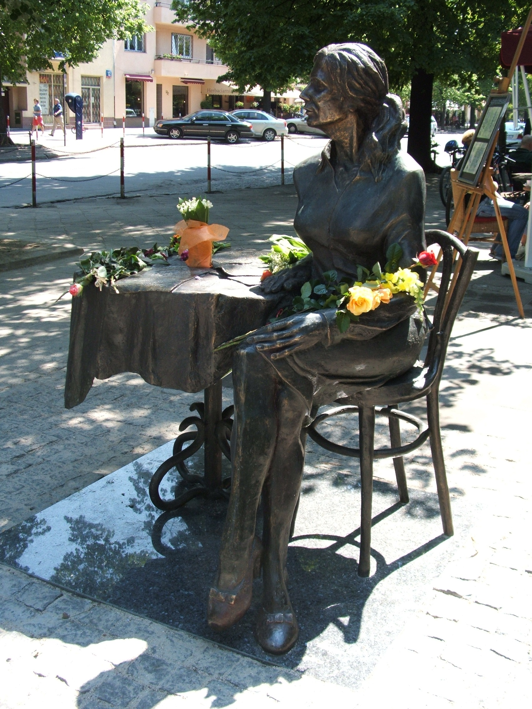 Pomnik Agnieszki Osieckiej, ul. Francuska, Warszawa